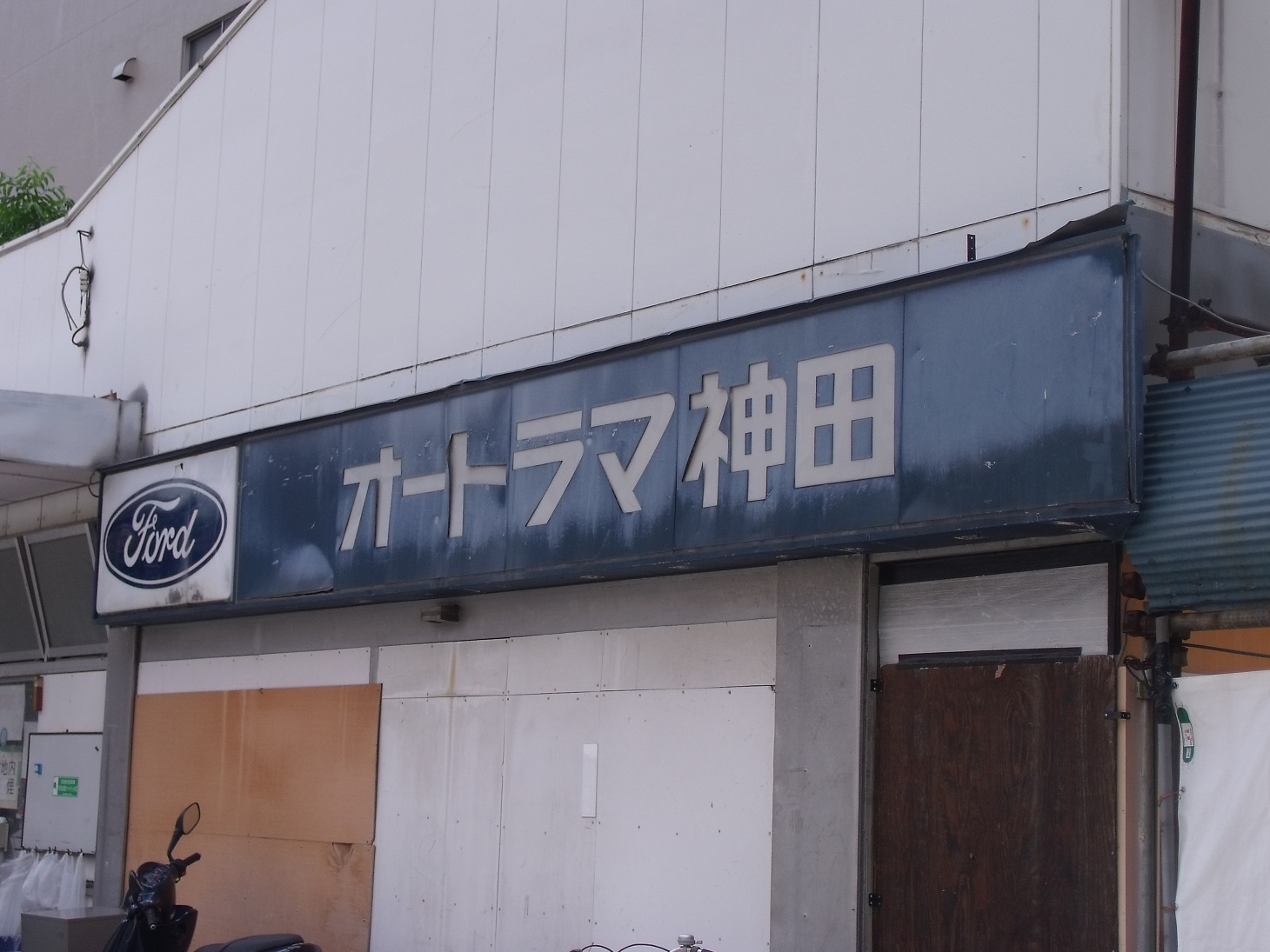 投稿者本人による撮影